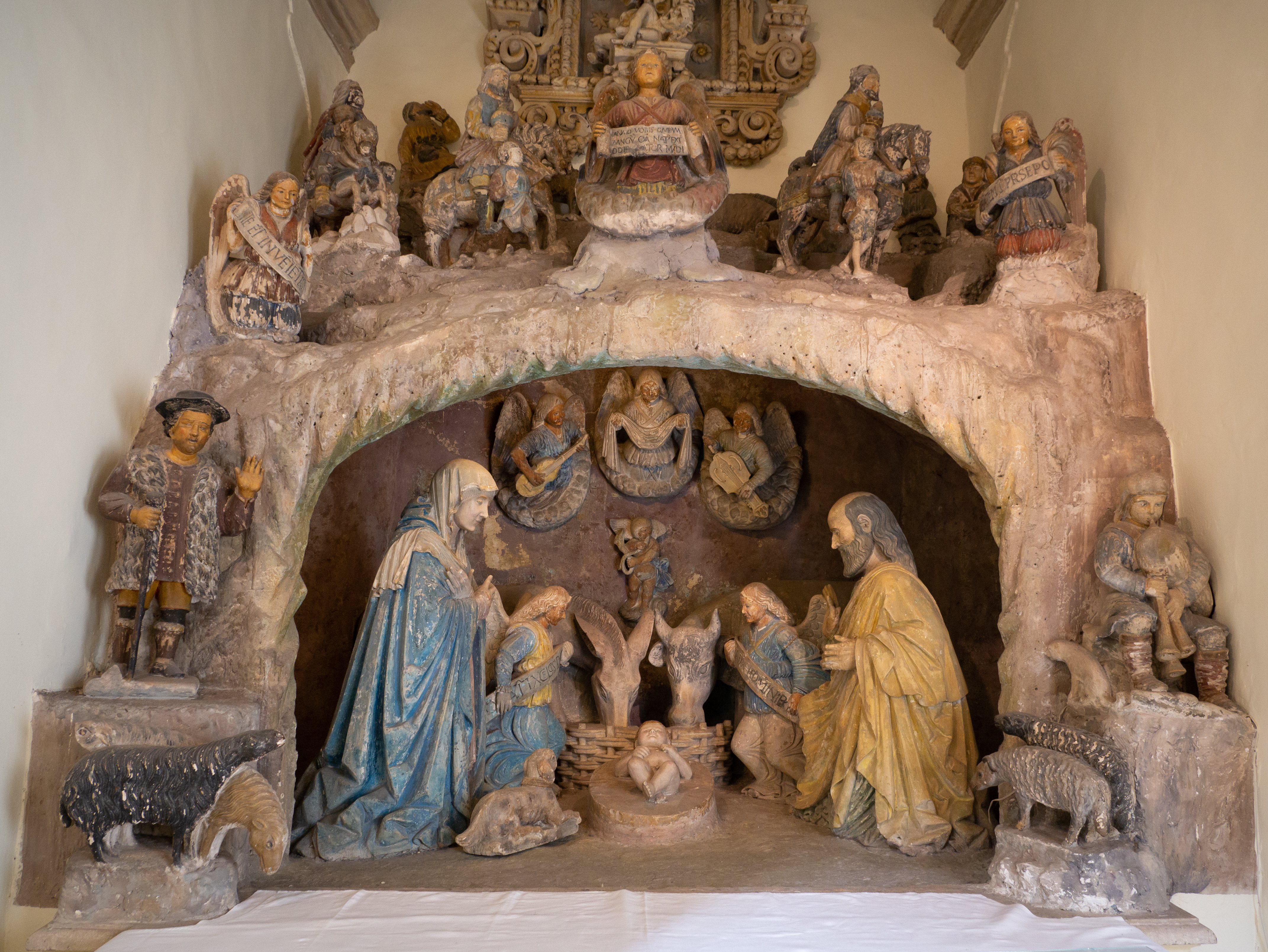 Presepe in pietra policroma di Stefano da Putignano, Grottaglie (TA).